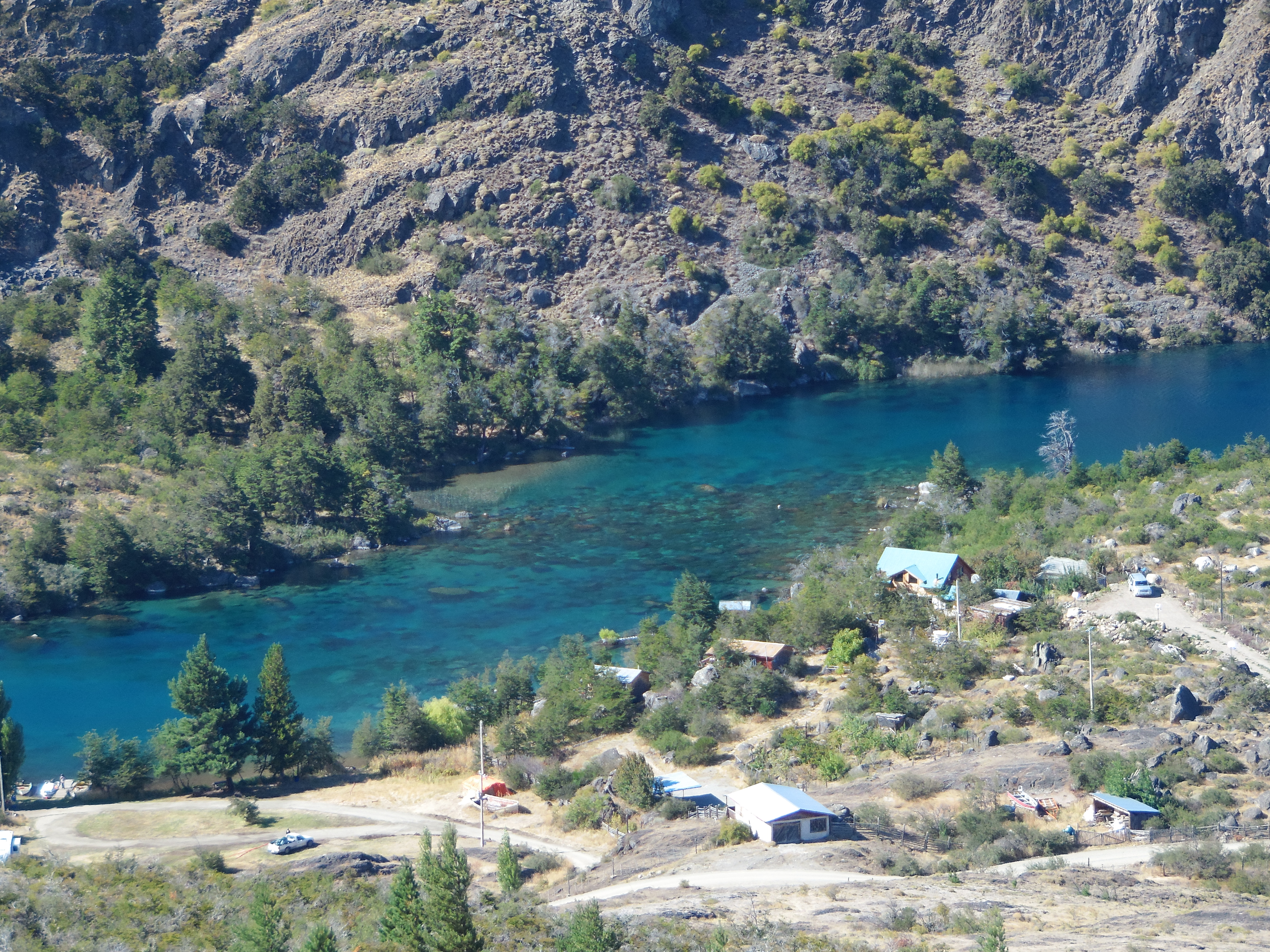 Reserva Nacional Lago Cochrane, Región de Aysén, Chile.